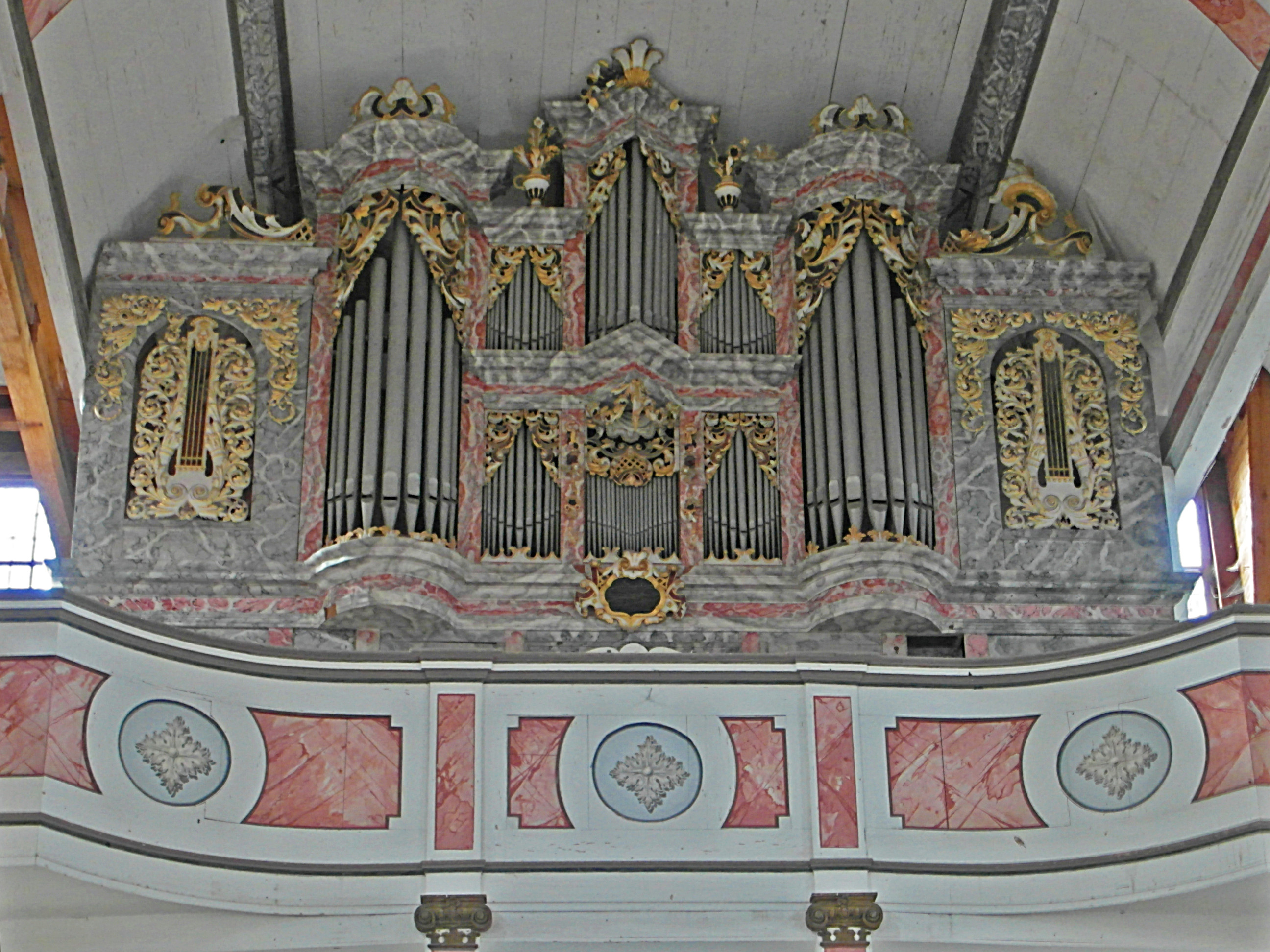 Orgel in St. Mauritius und Andreas Kleinneuhausen, ca. 1900 änderte Friedrich Wilhelm Böttcher die Disposition